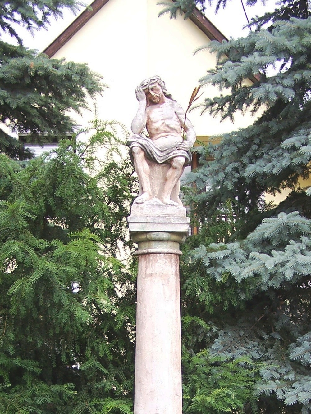 Ecce Homo-szobor (Fertőboz, Fő utca 39. előtt) This is a photo of a monument in Hungary, Identifier: 4050